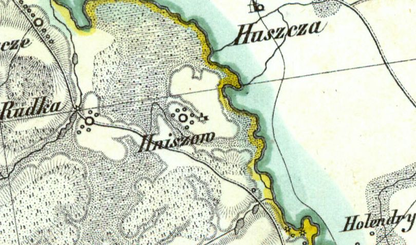 Hniszów (pow. chełmski) na mapie D.G. Reymanna (XIX w.)